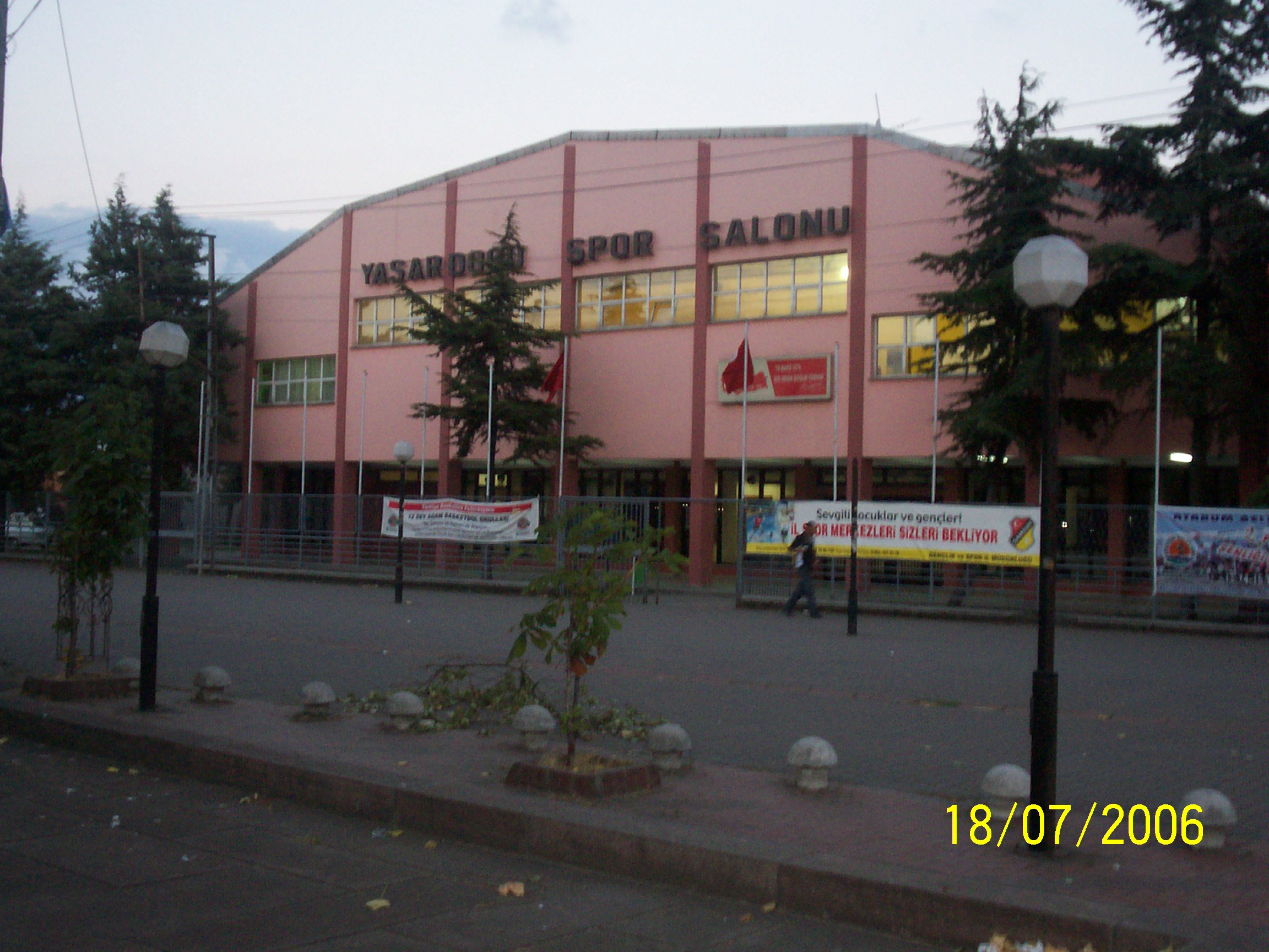 samsun_19mayıs